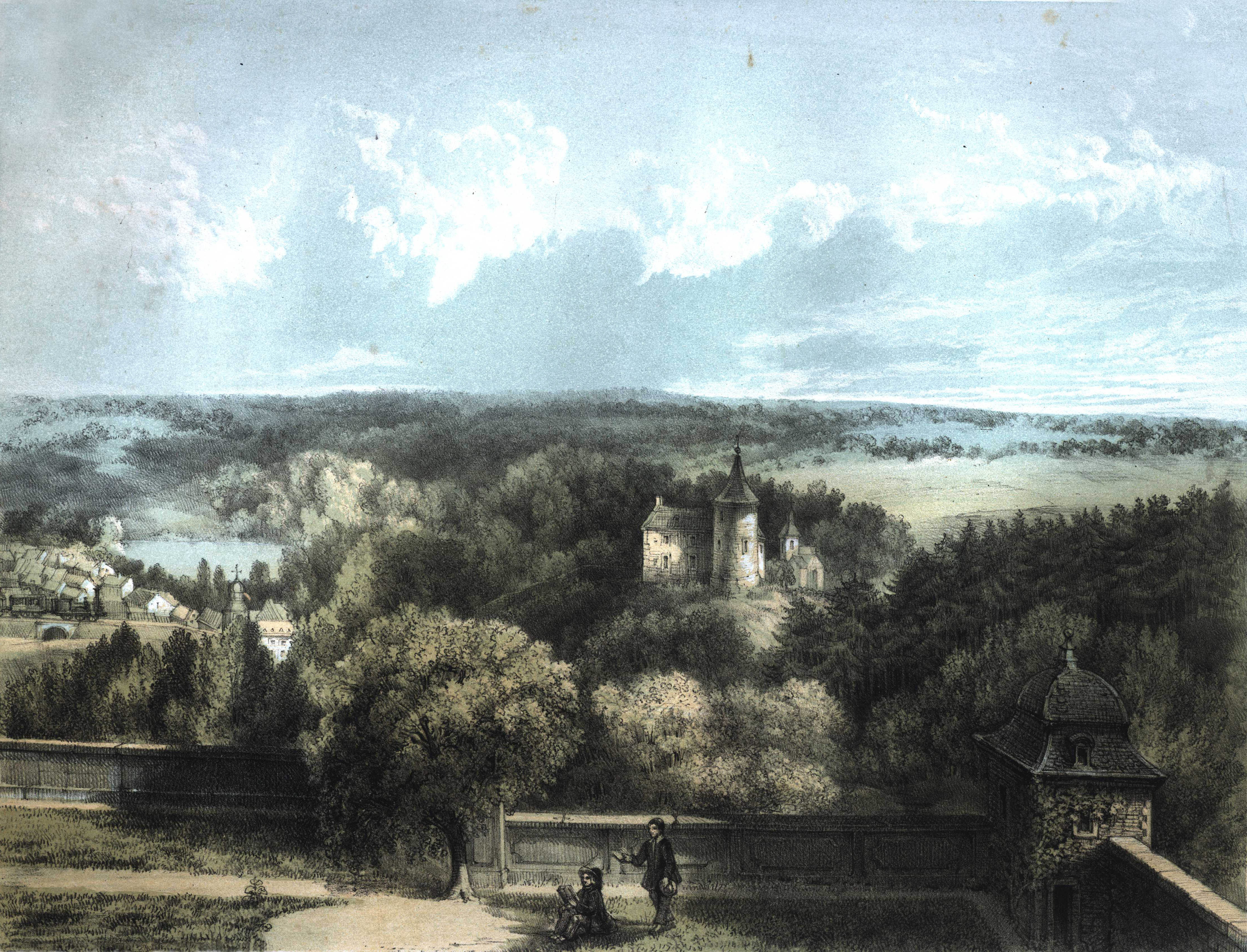 Kleurenlithografie door Alexander Schaepkens van de omgeving van Abdij Rolduc. Hier de Burg Rode in Herzogenrath, gezien vanaf de abdij. Gepubliceerd in 1852 in een boek met 8 lithografieën, getiteld: Rolduc et ses Environs, dessinés d'après nature, et lithographiés par Alexandre Schaepkens. Paysages et Monuments du Duché de Limbourg, avec texte archéologique et historique. Collectie RHCL Maastricht, RAL P-0004-005.